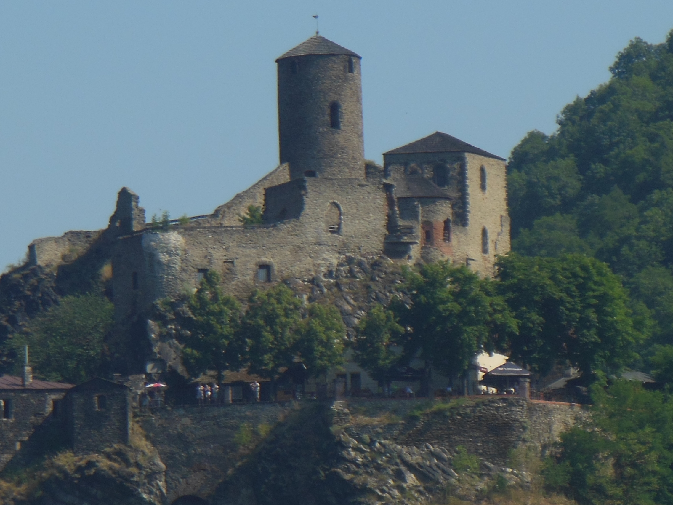 Hrad Střekov v Ústí nad Labem. Pohled z vlaku.